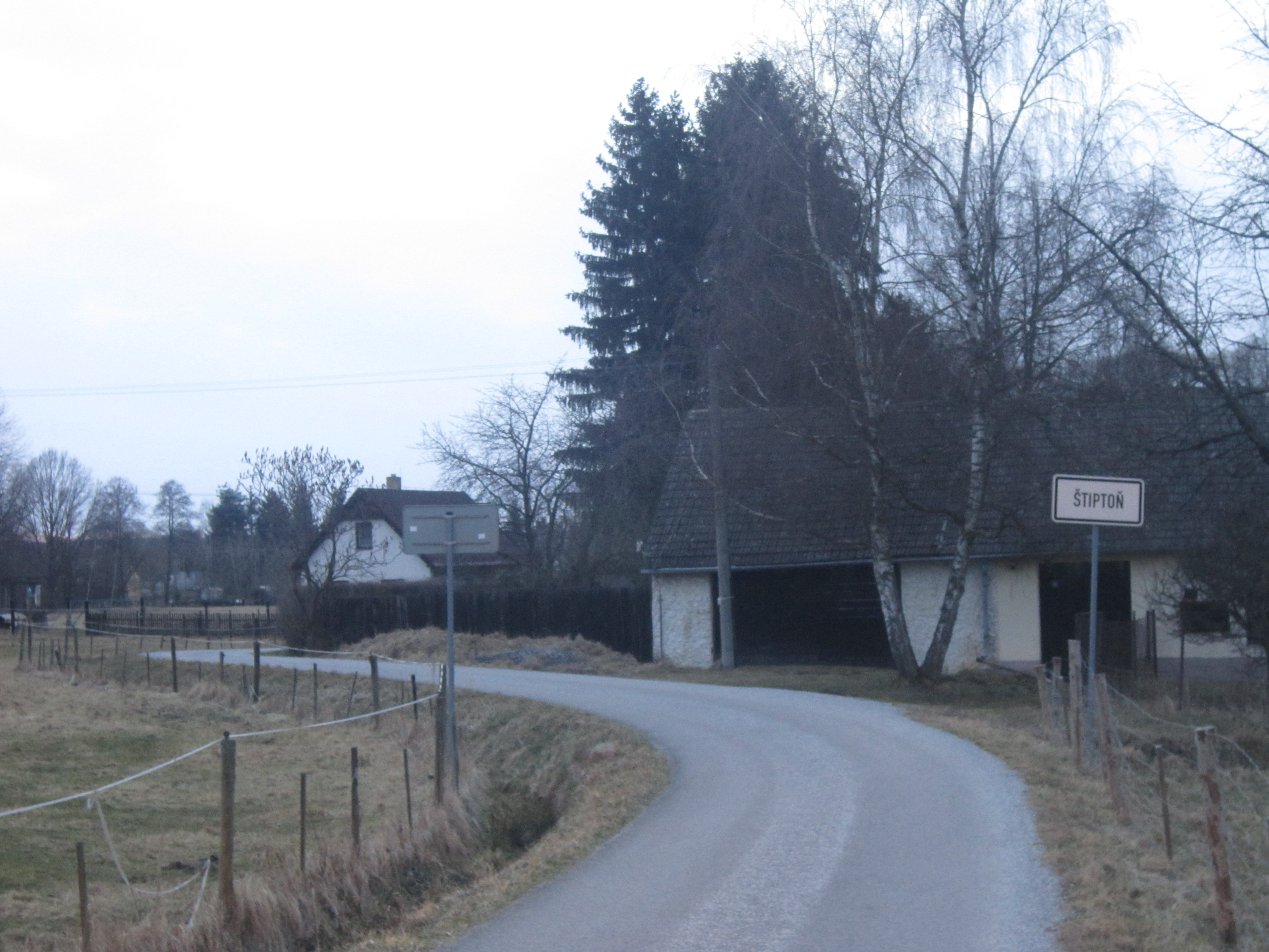 Vjezd do vesnice Štiptoň.